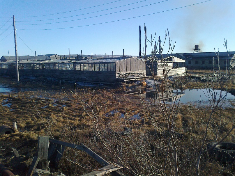 Заброшенная улица Озёрная в посёлке Усть-Куйга, Якутия